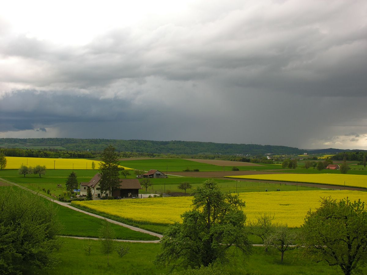 Switzerland, Canton of Schaffhausen, Dörflingen, Chirchewis und Chirchenacker